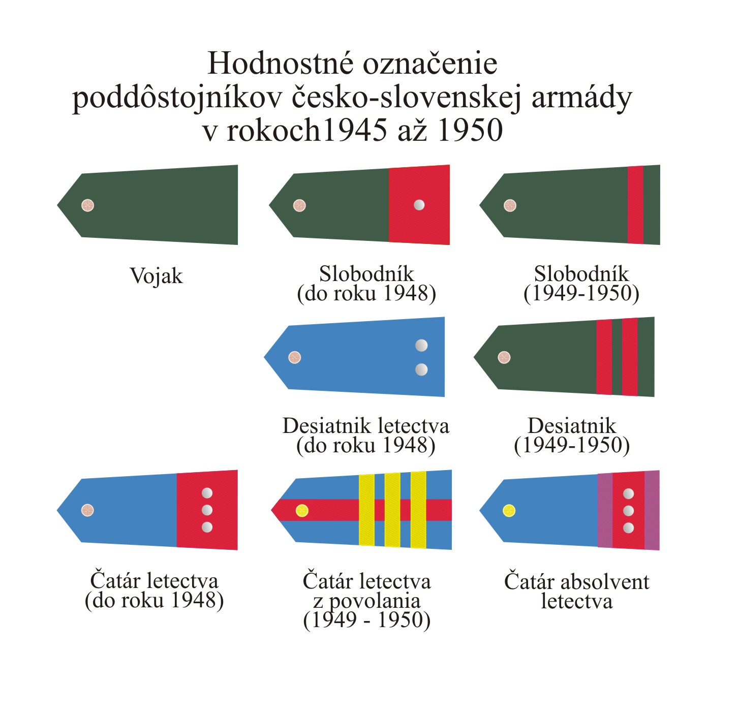 Hodnostné označenie poddôstojníkov Česko-Slovenskej armády v rokoch 1945 až 1950